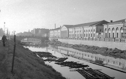 Обводный канал прорыт, чтобы ослабить наводнения. Время и наука показали, что в деле борьбы с наводнениями Обводный канал бесполезен. Зато он оказался удобен для грузовых перевозок, соединив разные промышленные зоны между морским портом и речным, находившимся на Неве близ Александро-Невской лавры. По каналу также осуществляли сплав леса. Фото 1950-х годов.